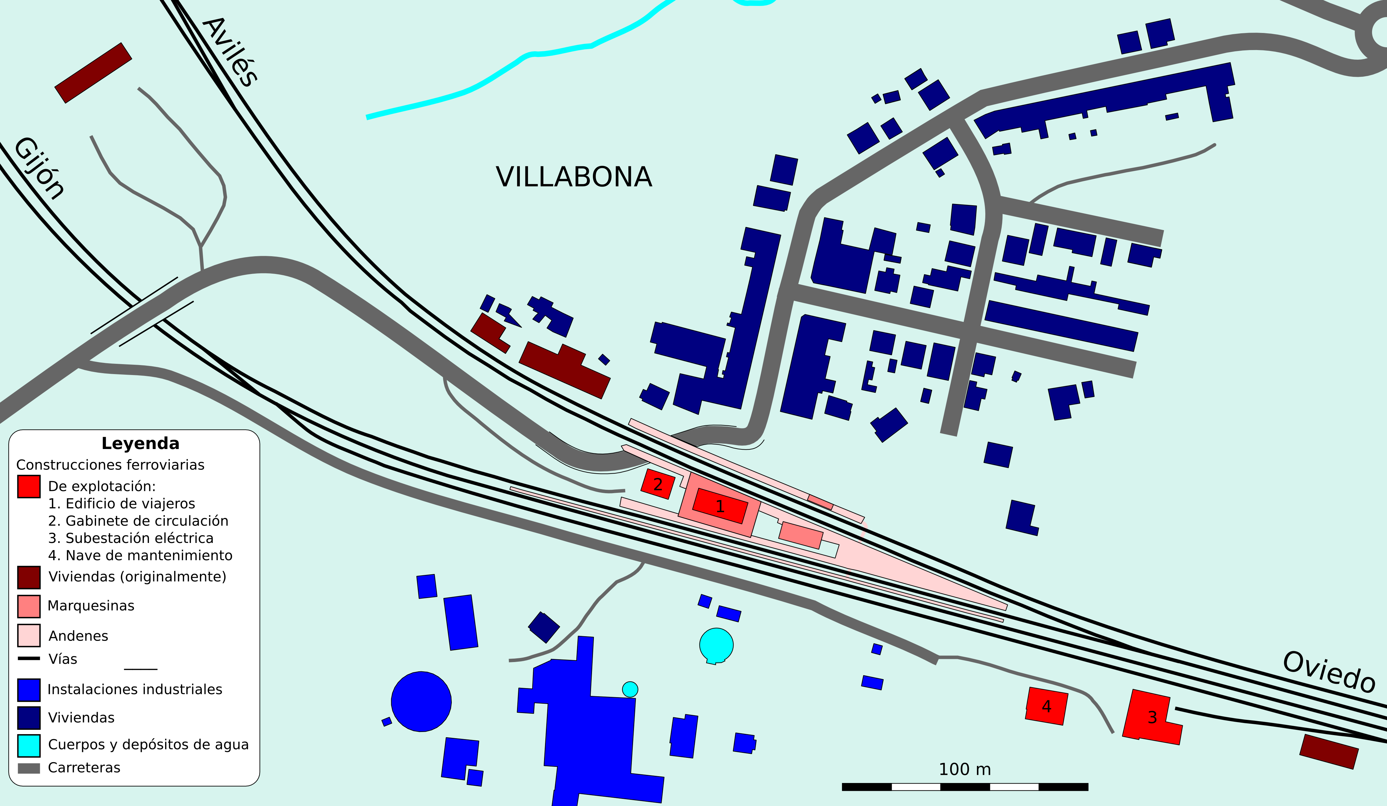 Instalaciones ferroviarias de la estación de Villabona de Asturias (España)